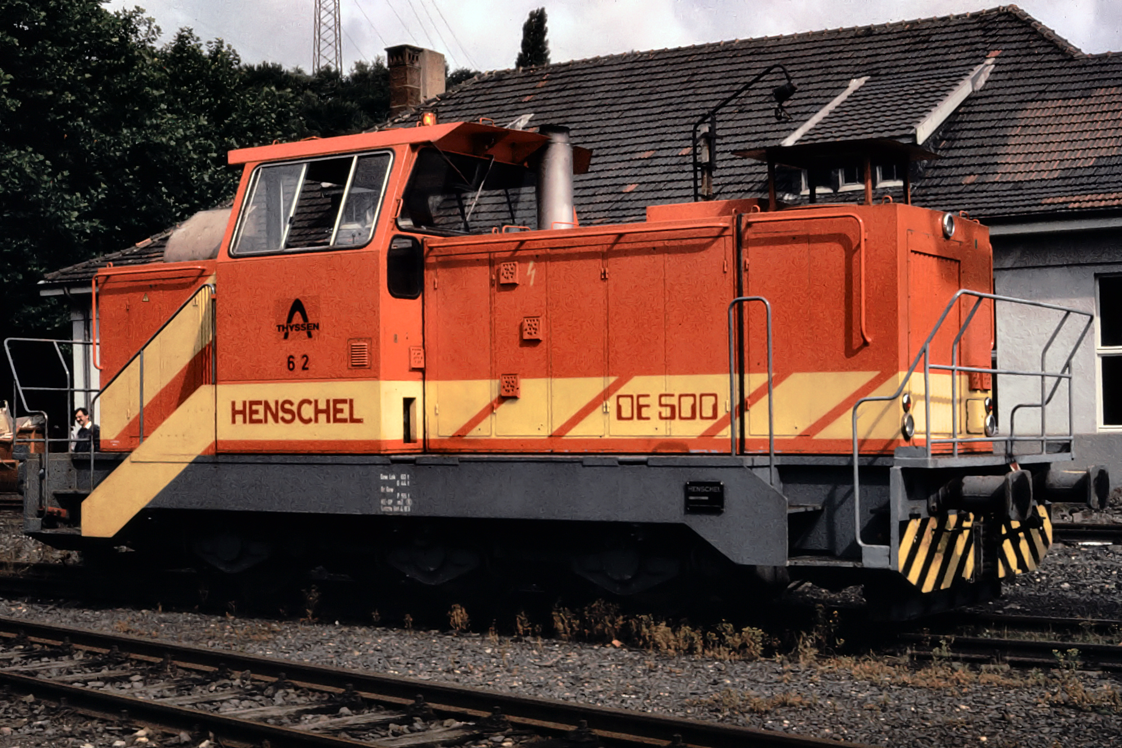 Henschel DE 500 C als Lok 62 der Fa. Thyssen in Bochum-Dahlhausen